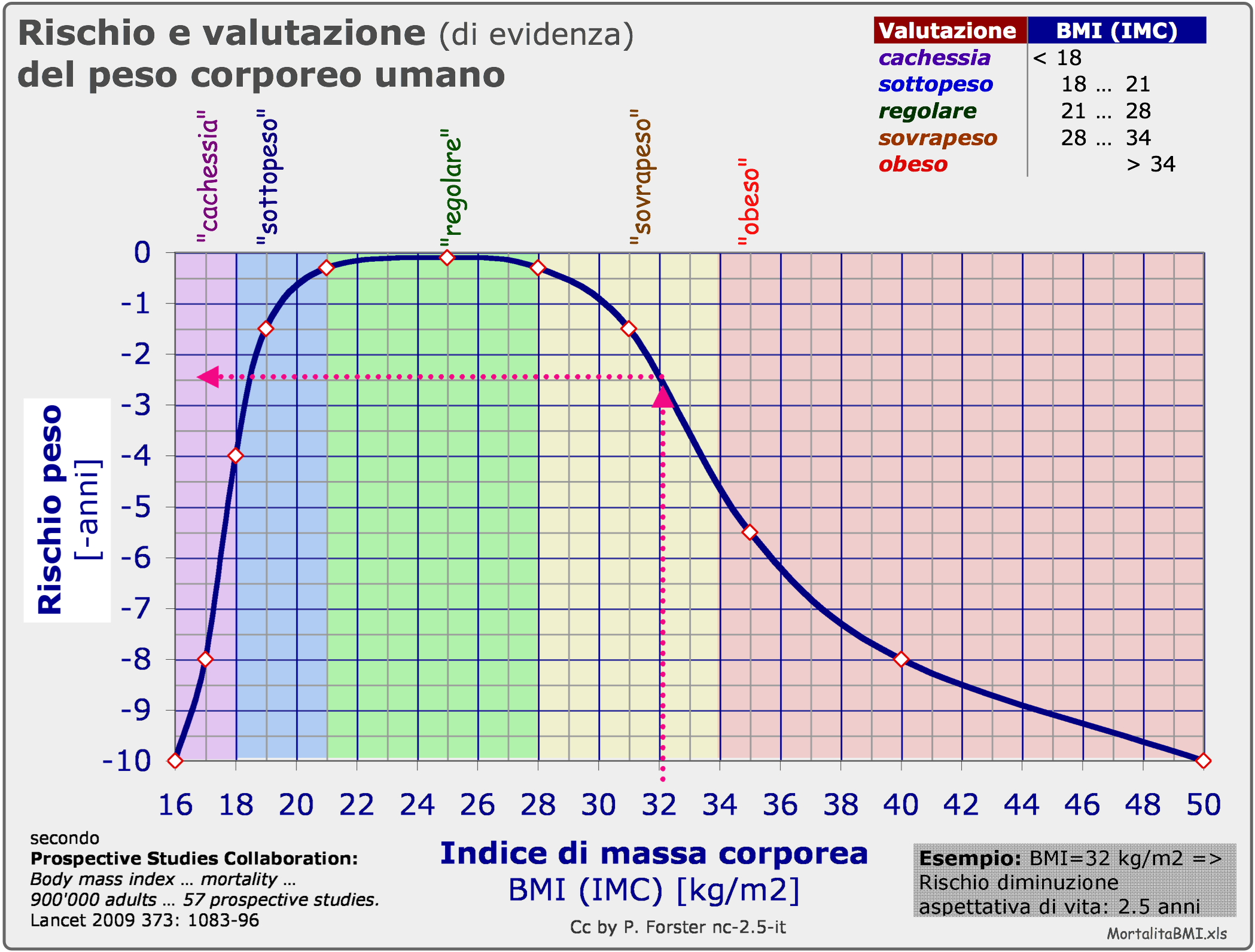 Rischio e valutazione (di evidenza) del peso corporeo umano: rischio, diminuzione, aspettativa di vita, valutazione, evidenza, peso, corporeo, umano, forma, body mass index, BMI, indice di massa corporea, IMC, cachessia, sottopeso, regolare, sovrapeso, obeso, Lancet, prospective studies collaboration